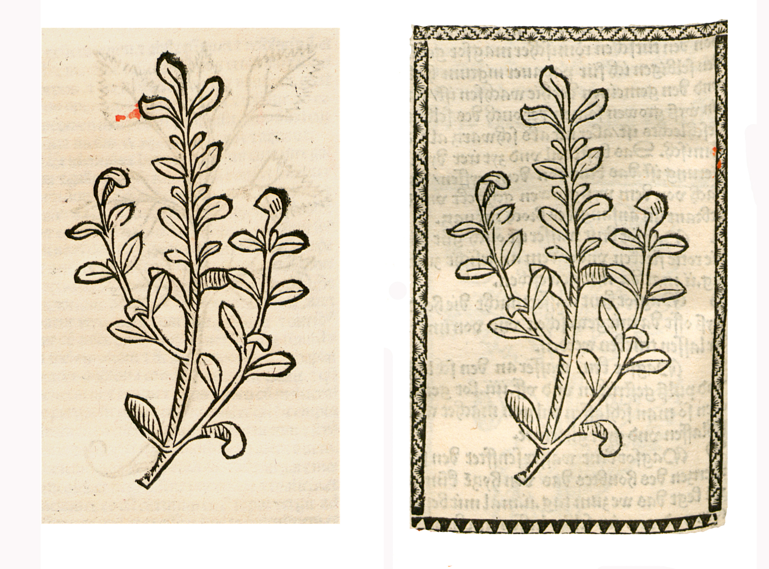 Abbildung von: Model Ger (Gentiana crutiata)